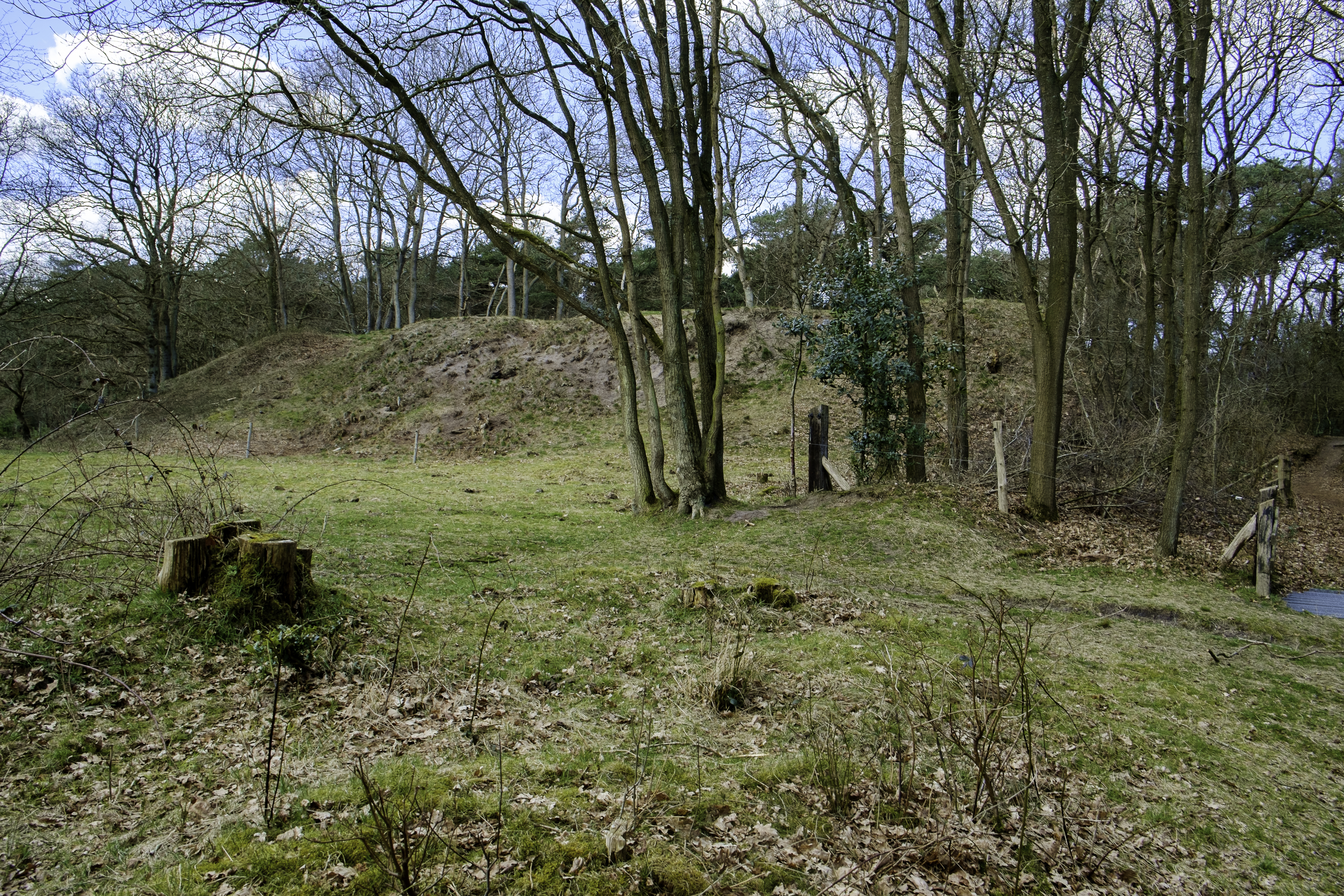 Voormalige kogelvanger ten zuiden van het Noordlaarderbos